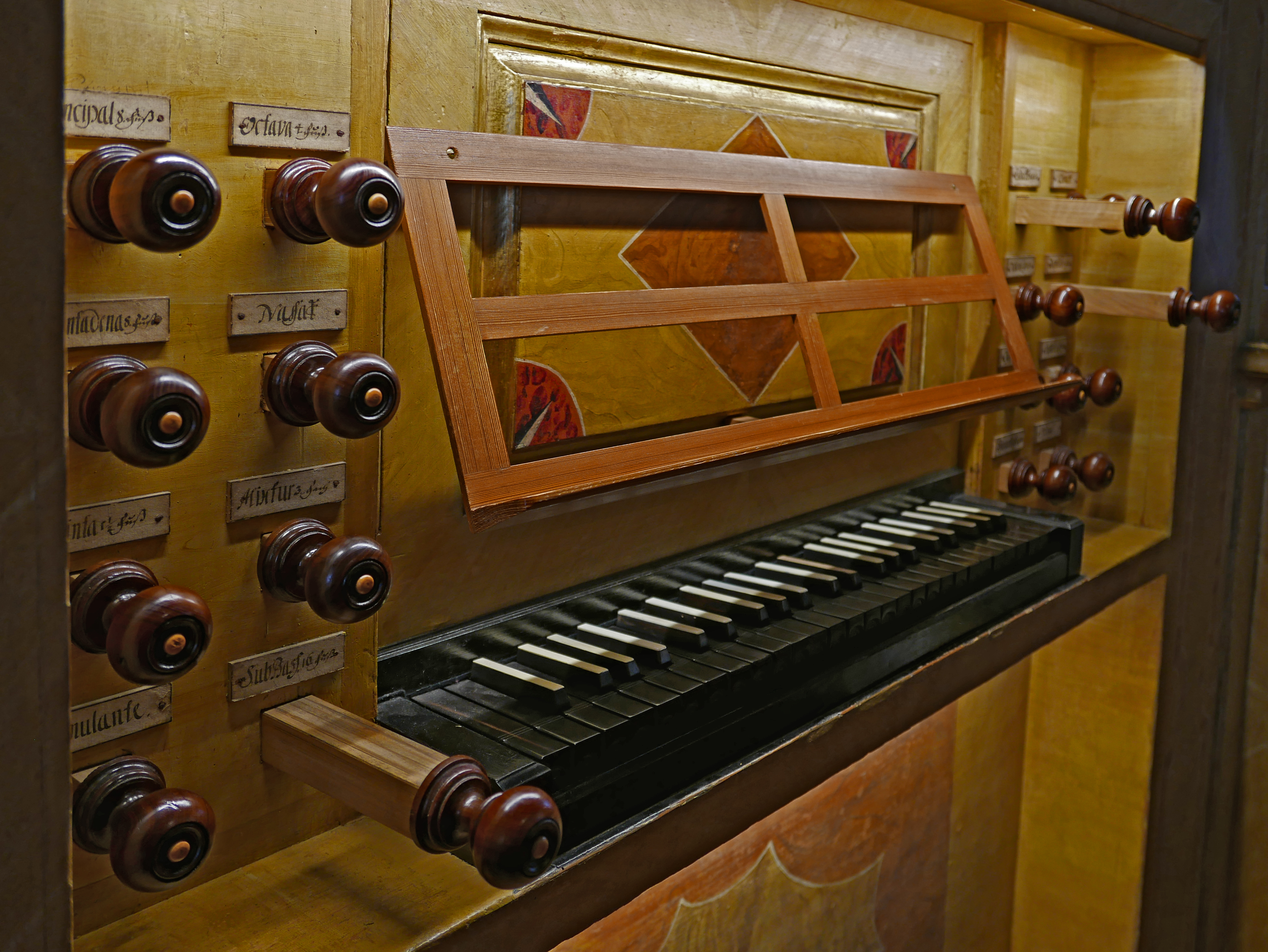 Silbermannorgel (1715) in der Kirche St. Georg Pfaffroda (Olbernhau) (Detail)